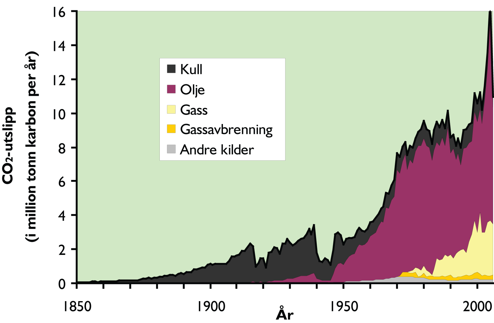 Norges årlige utslipp av karbondioksid etter opphav.